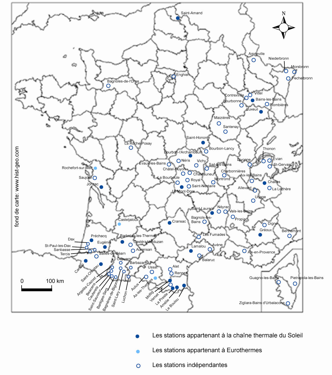 Carte de répartition des villes thermales en France.